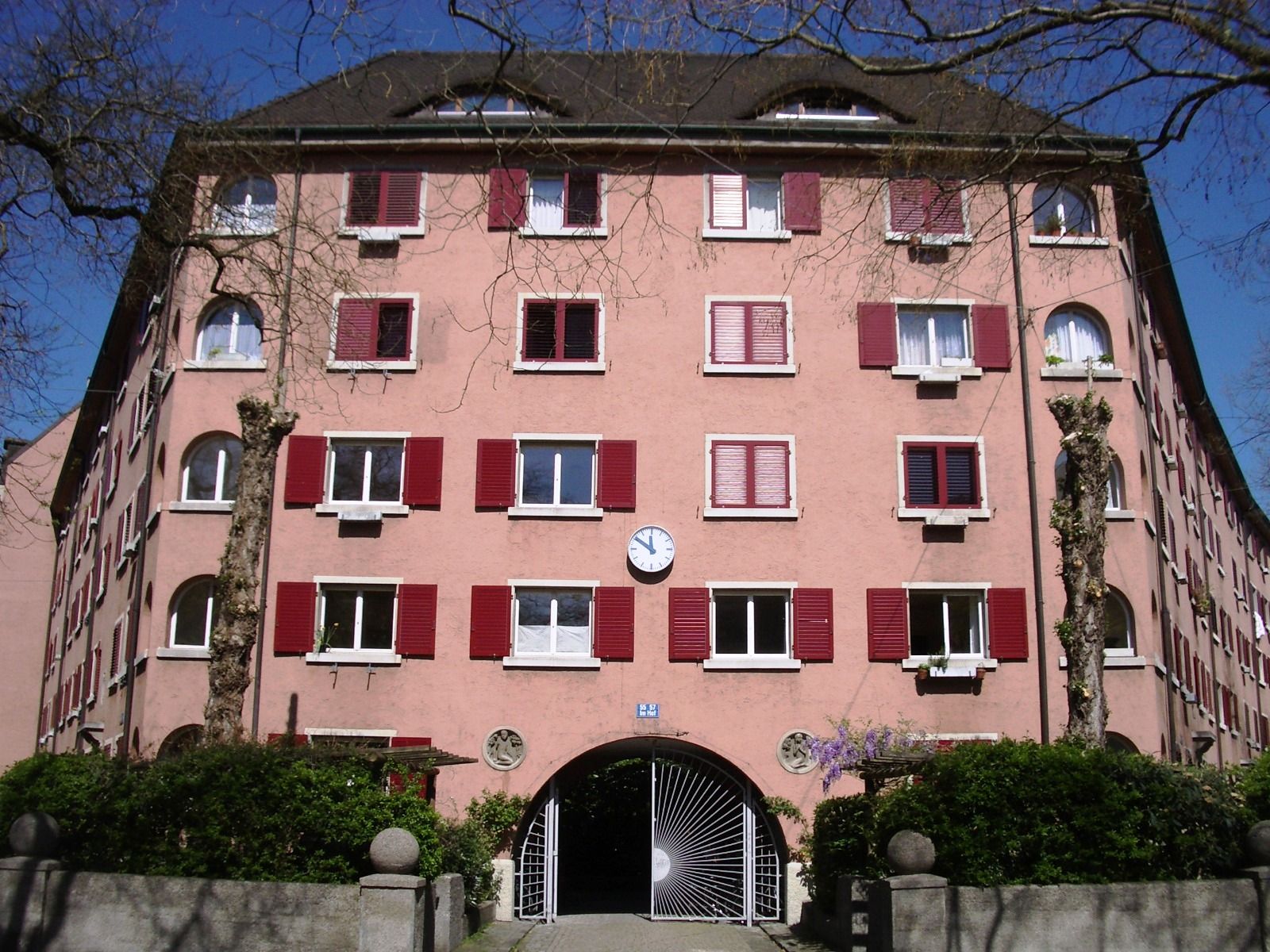 Zurich, Switzerland self-made, April 2007